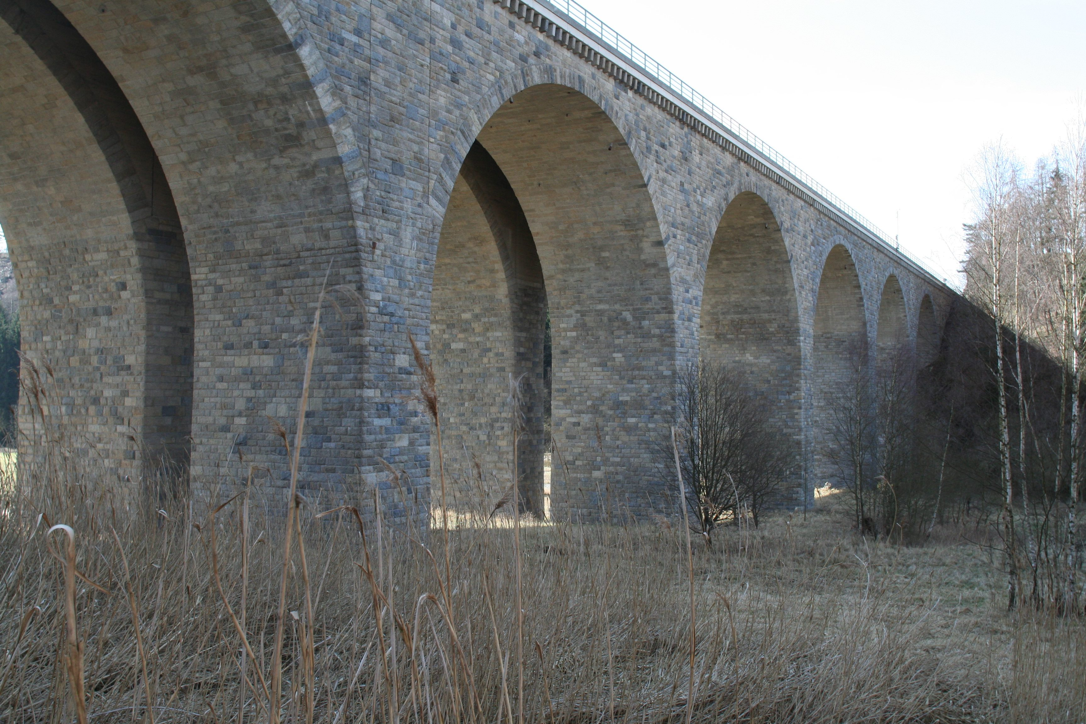 Saalebrücke Rudolphstein (Brücke der Deutschen Einheit) der A9, bei Lehesten Ortsteil von Hirschberg im Saale-Orla-Kreis; Blick auf Brücke Fahrtrichtung München